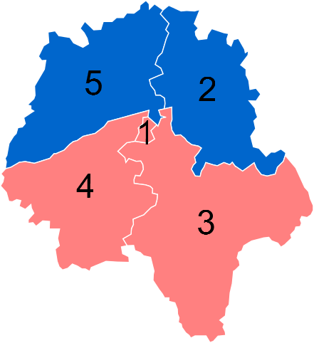 Résultats des élections législatives de l'Indre-et-Loire en 2012